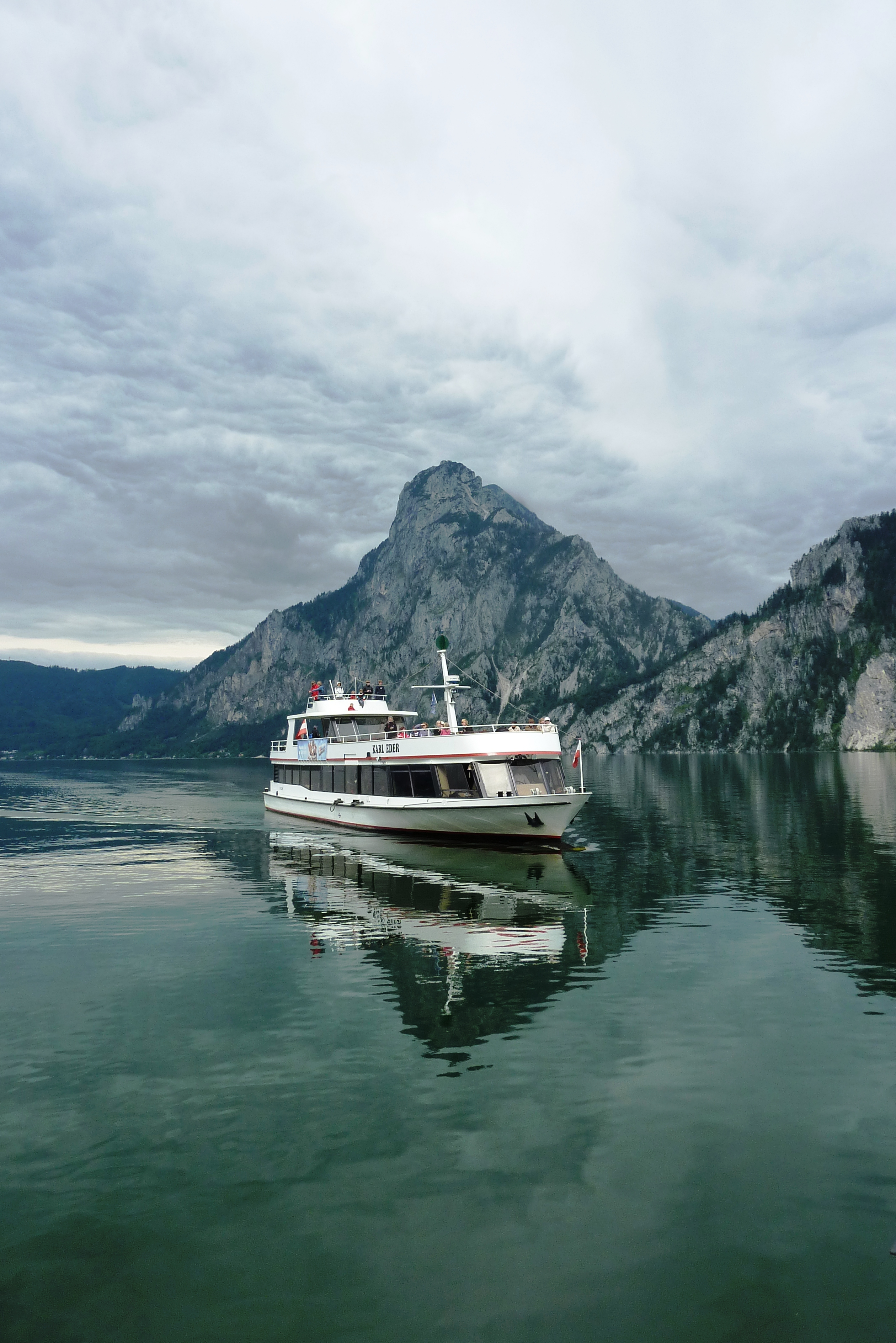 Traunstein (Österreich), vom Traunsee aus gesehen. Im Vordergrund das Schiff "Karl Eder".